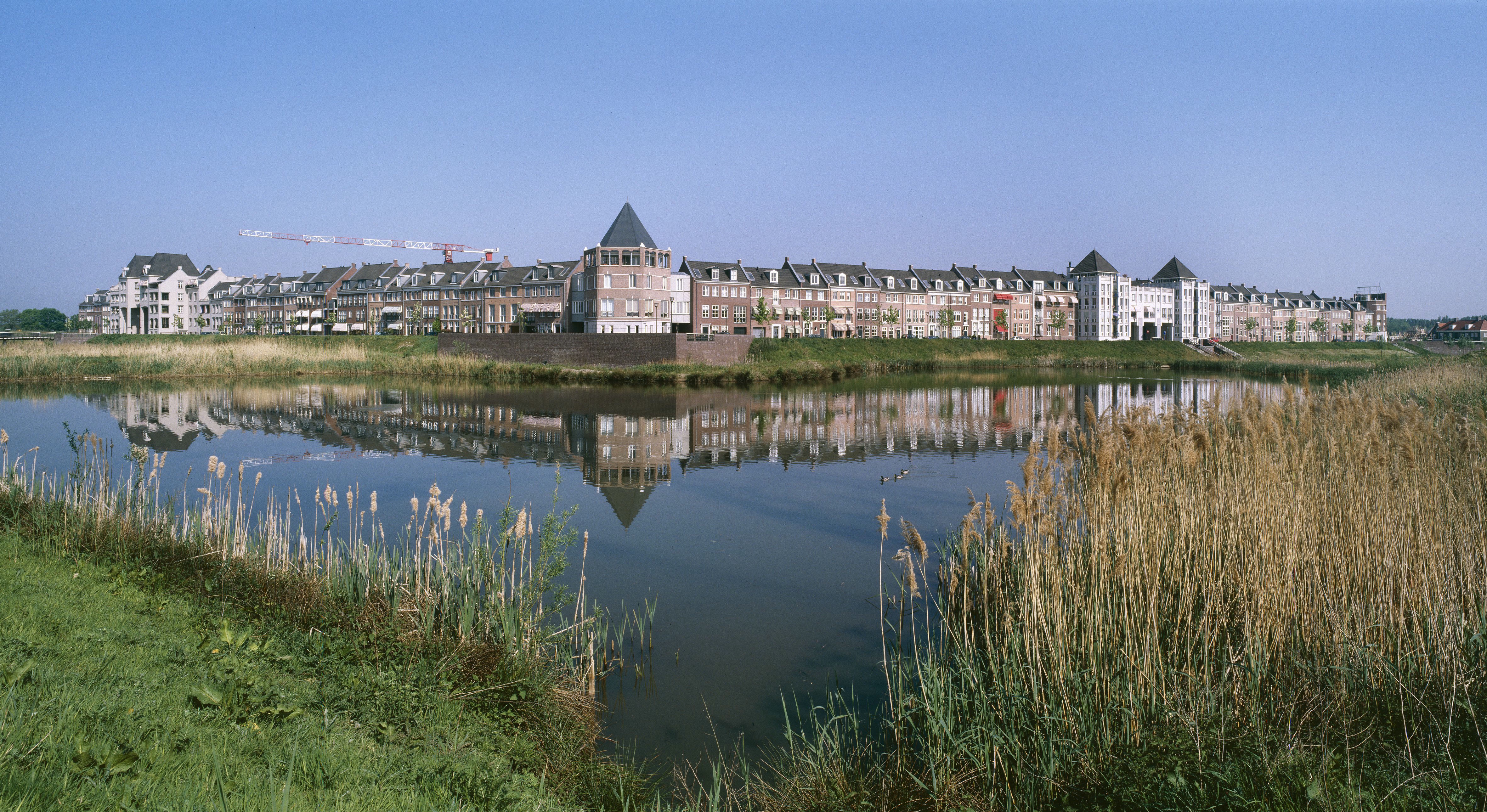 Brandevoort: Zicht op de wijk Brandevoort (opmerking: Foto's verkregen uit privé-collectie van fotograaf P. van Galen.)